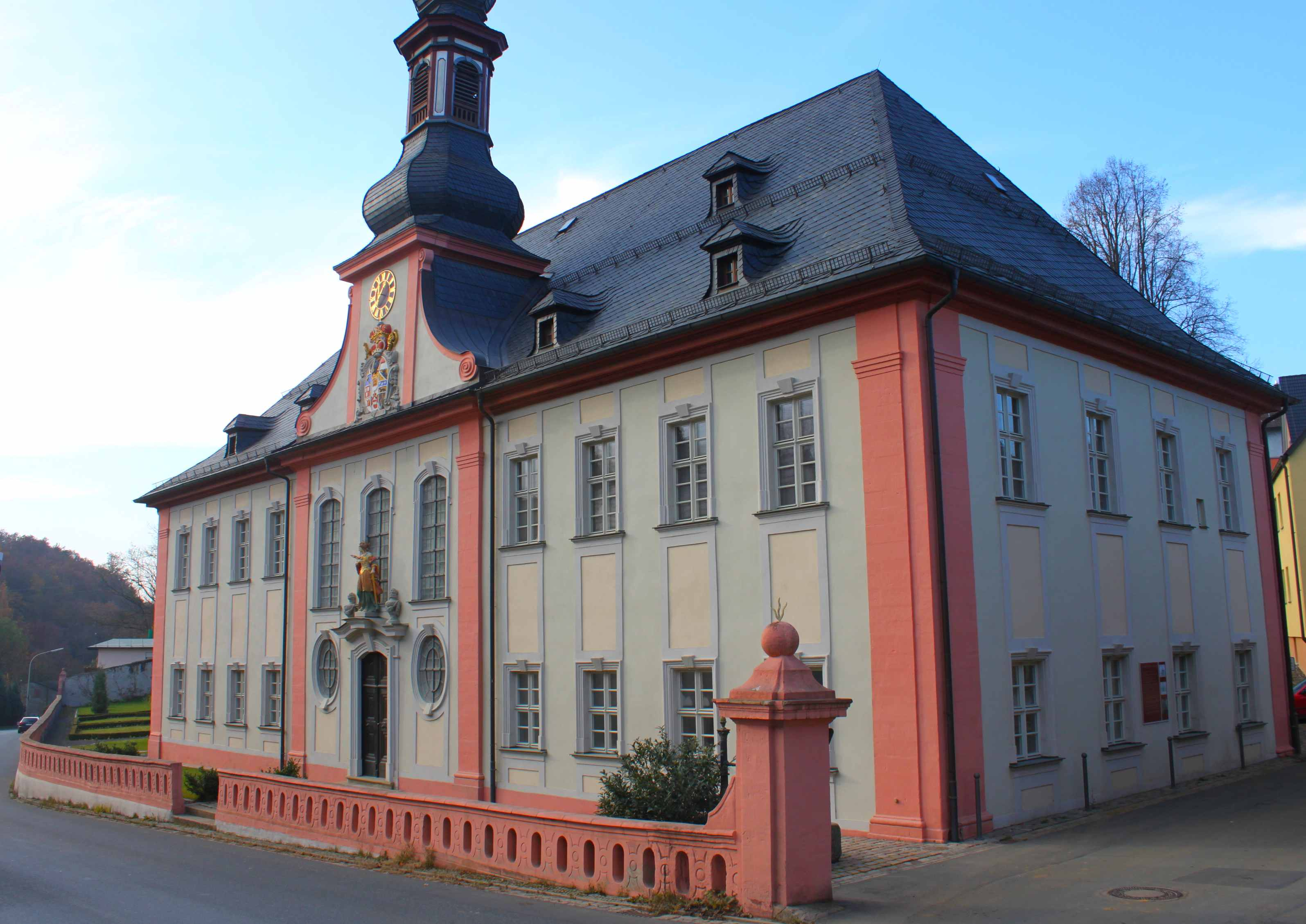 Das Hospital St. Katharina wurde 1337 durch Thomas Kürschner eröffnet. Das heutige Gebäude mit eingebauter Kirche stammt aus der ersten Hälfte des 18. Jahrhunderts. Die Spittalkirche wurde 1729 unter dem Kurfürsten Lothar Franz von Schönborn zu Mainz und Fürstbischof zu Bamberg neu erbaut, der die Einweihung nicht mehr erlebte. Sein kurfürstliches Wappen ziert heute noch das Kirchenportal.